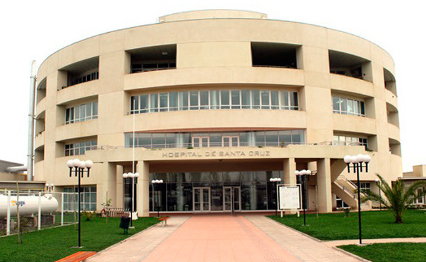 Avances Infraestructura Hospitalaria